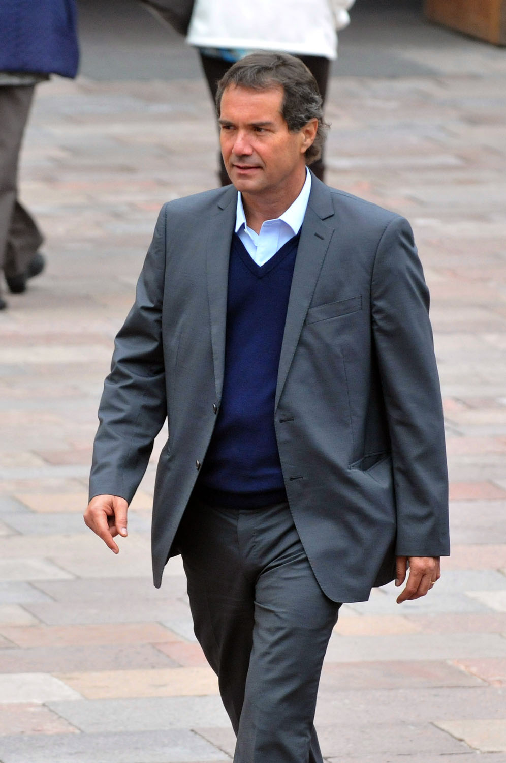 Neven Ilic, presidente del COCH.